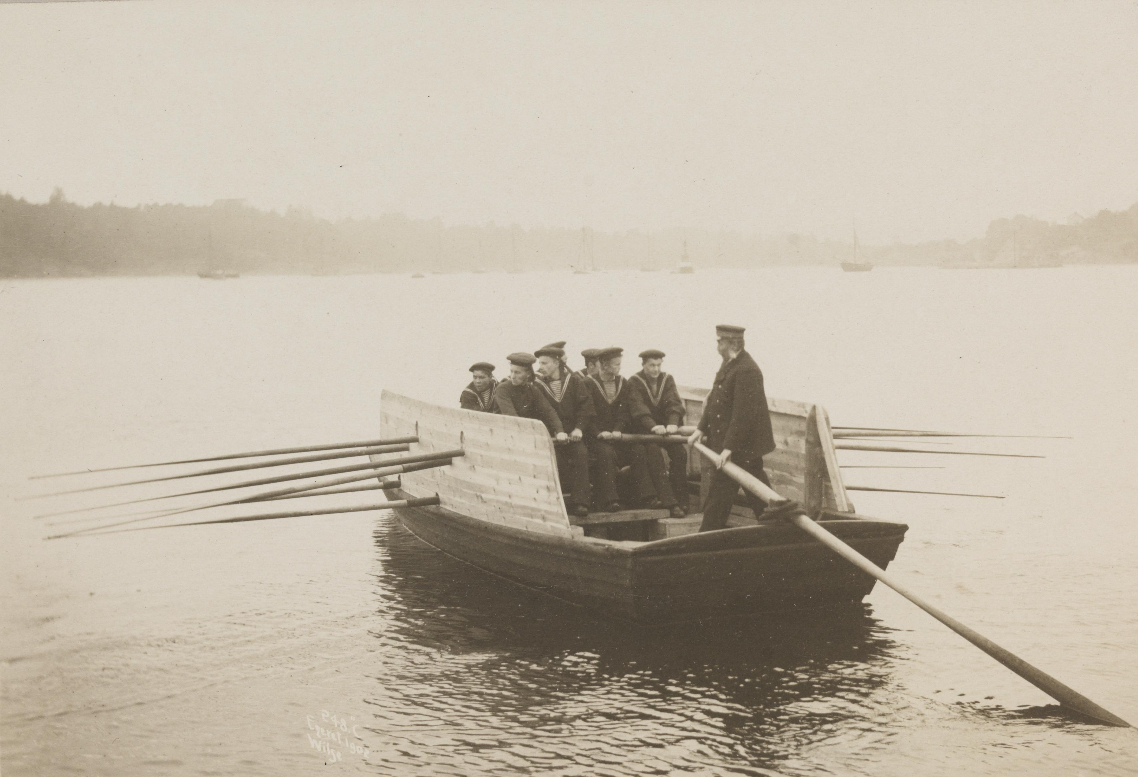 Bildet er hentet fra Nasjonalbibliotekets bildesamling. Anmerkninger til bildet var: Tittel hentet fra påskrift på komponentnr 1, samt fotografens egen nummerering